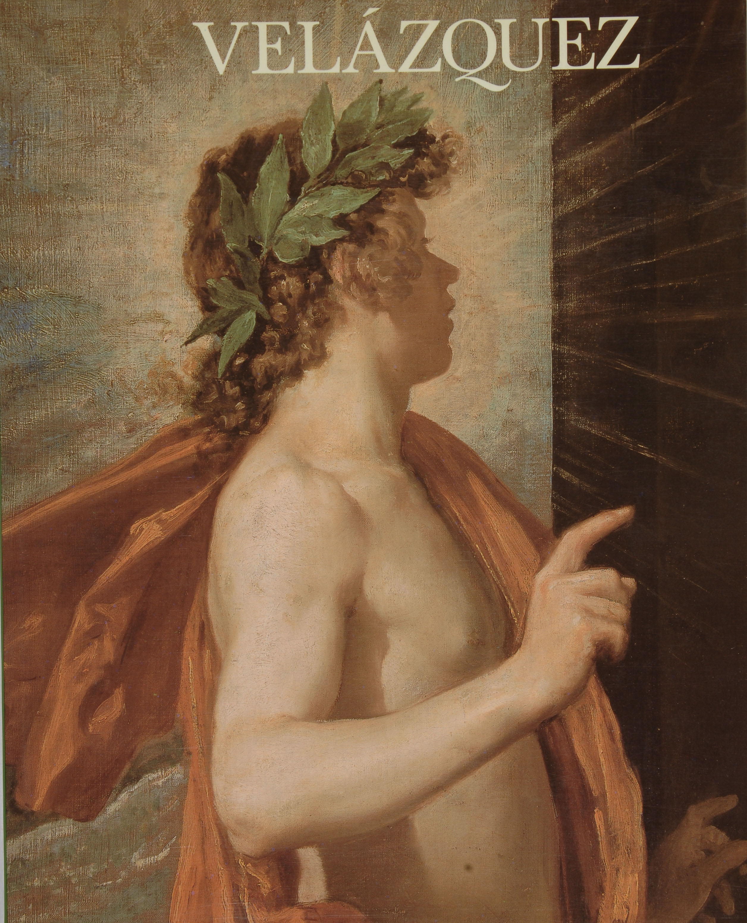 Portada del Catalogo de la exposición sobre Velázquez en el Museo del Prado en 1990